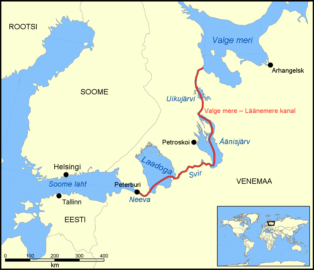 Valge mere – Läänemere kanali kaart